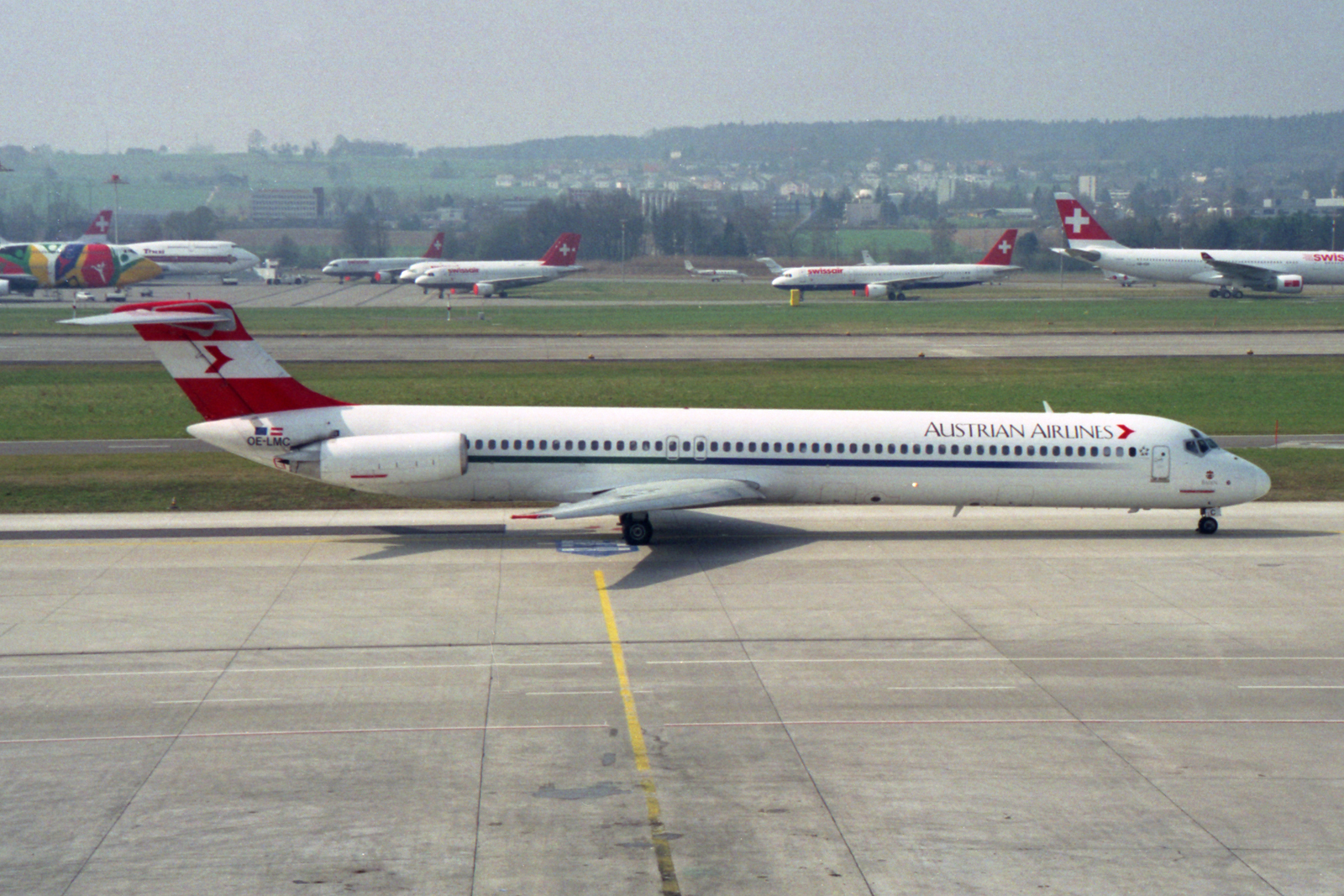 Zürich (- Kloten) (ZRH / LSZH) Switzerland 3.2002